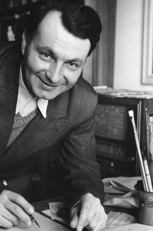 Karikaturist E. O. Plauen 40 Jahre alt Am 18. März wird der bekannte Karikaturist Plauen 40 Jahre alt. Plauen gehört zu den besten politischen Karikaturisten Deutschlands und ist durch seine Karikaturenbücher "Vater und Sohn", sowie durch seine vornehmlich im "Reich" erschienenden politischen Karikaturen bekannt und beliebt geworden.